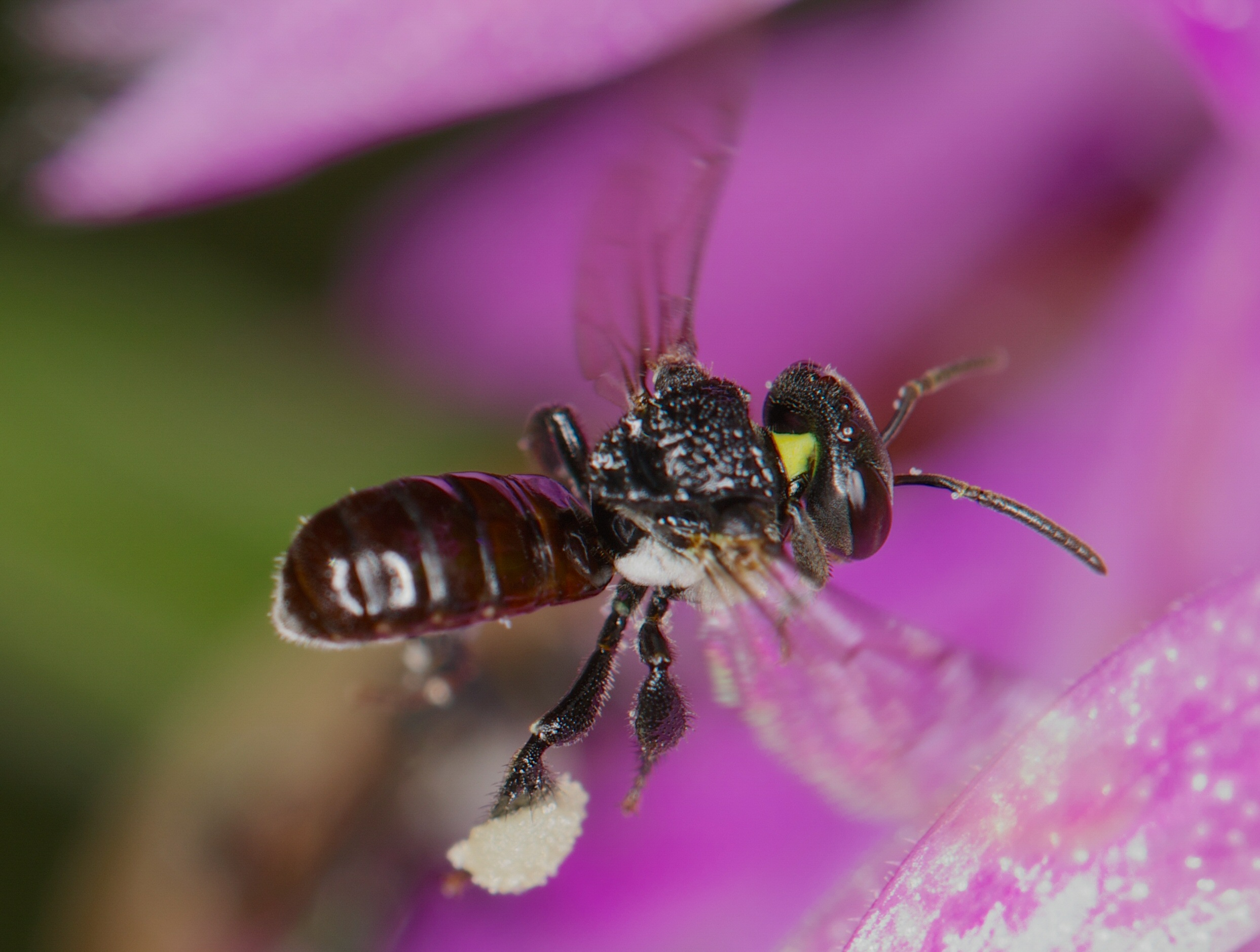 Sugar bag bee